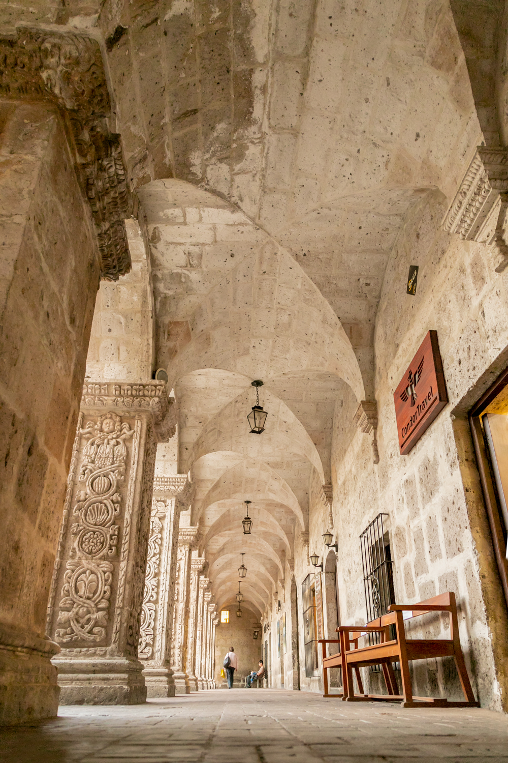 Arquitectura en base al sillar, piedra volcánica producto de las erupciones de la zona en el pasado